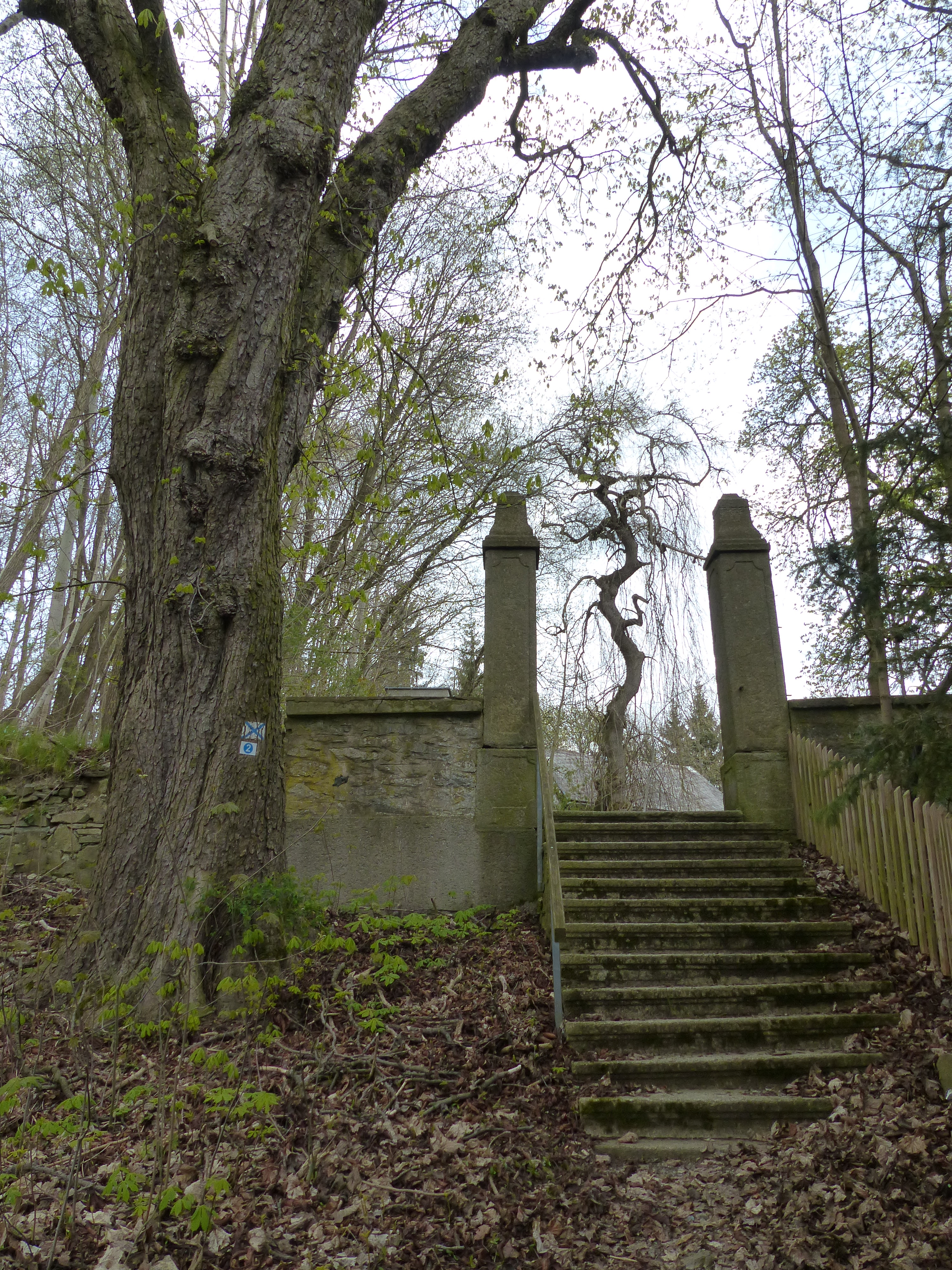 Serie Baudenkmäler und Ansichten von Regnitzlosau